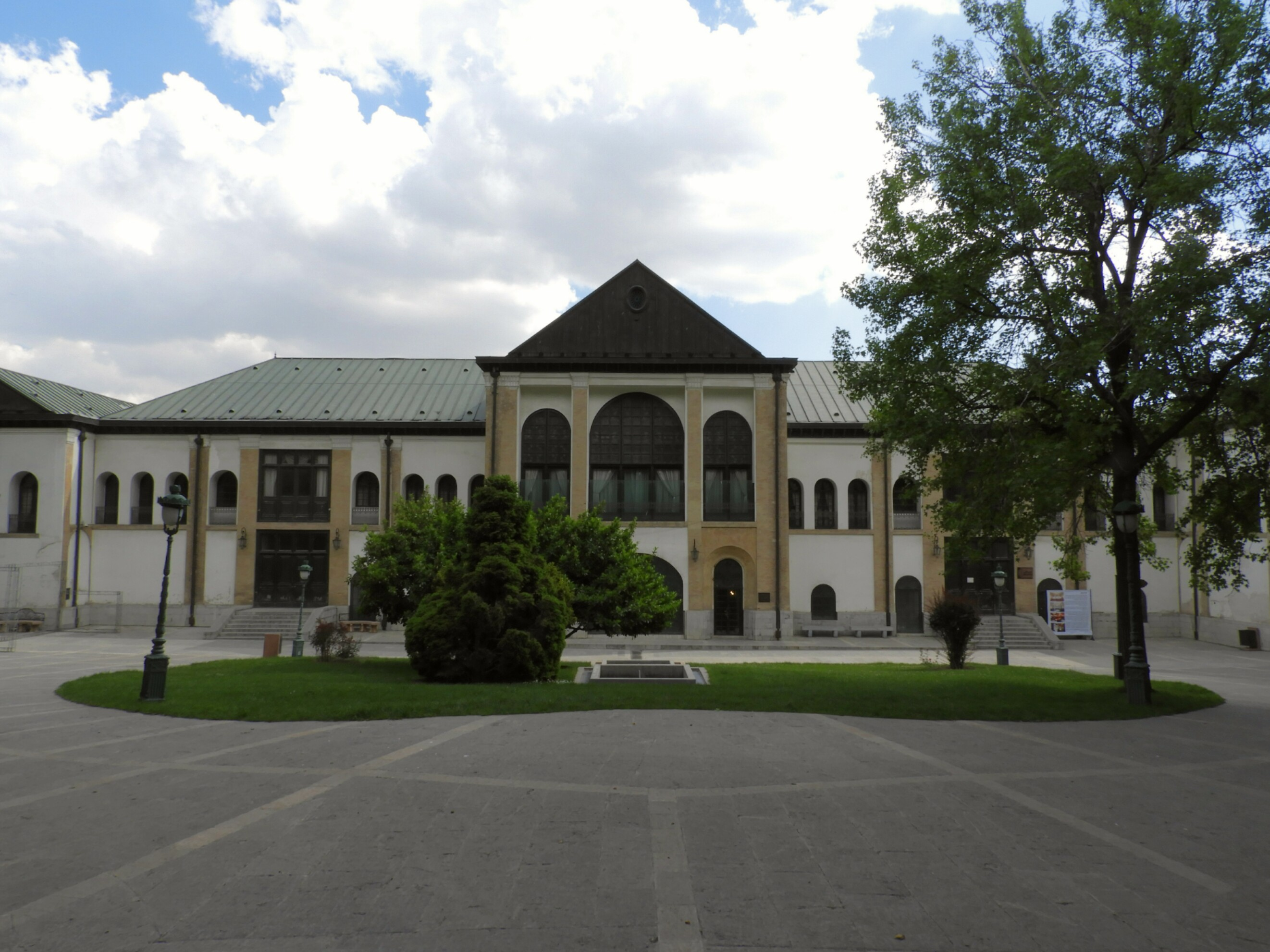 کاخ صاحبقرانیه